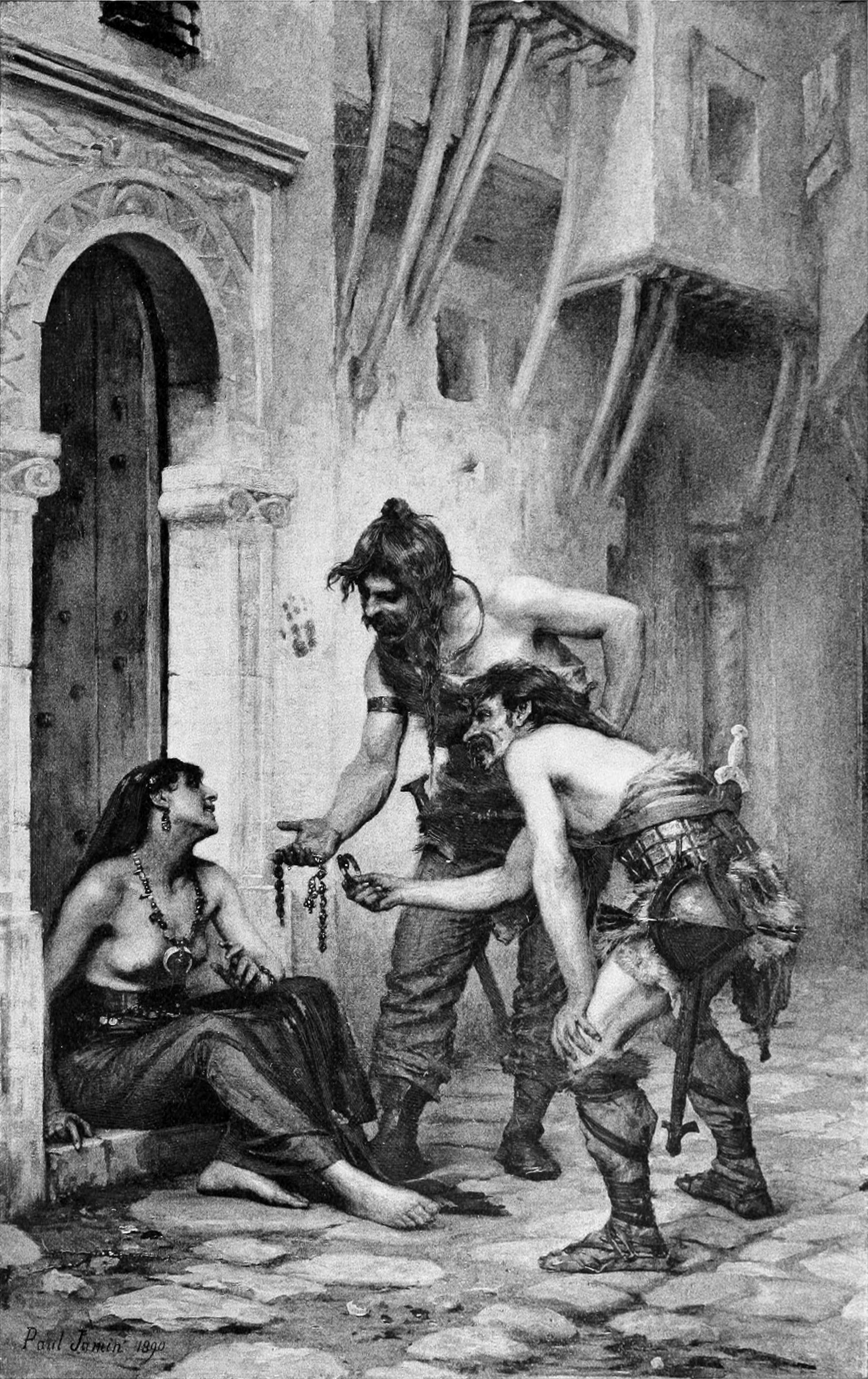 Tentation ; mercenaires gaulois d'Annibal à Carthage